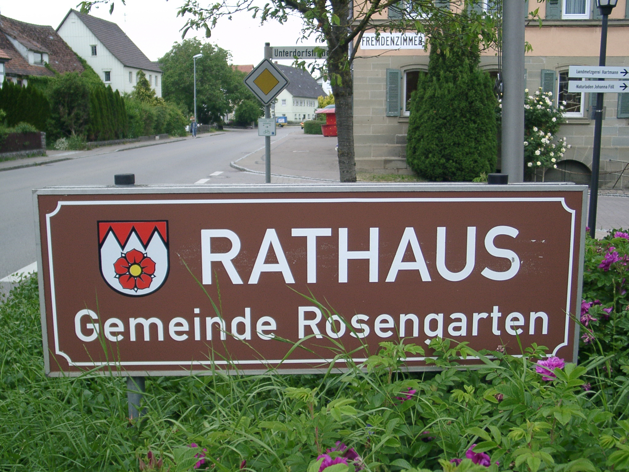 Wappentafel neben der B 19 im Ort Uttenhofen der Gemeinde Rosengarten am Kocher